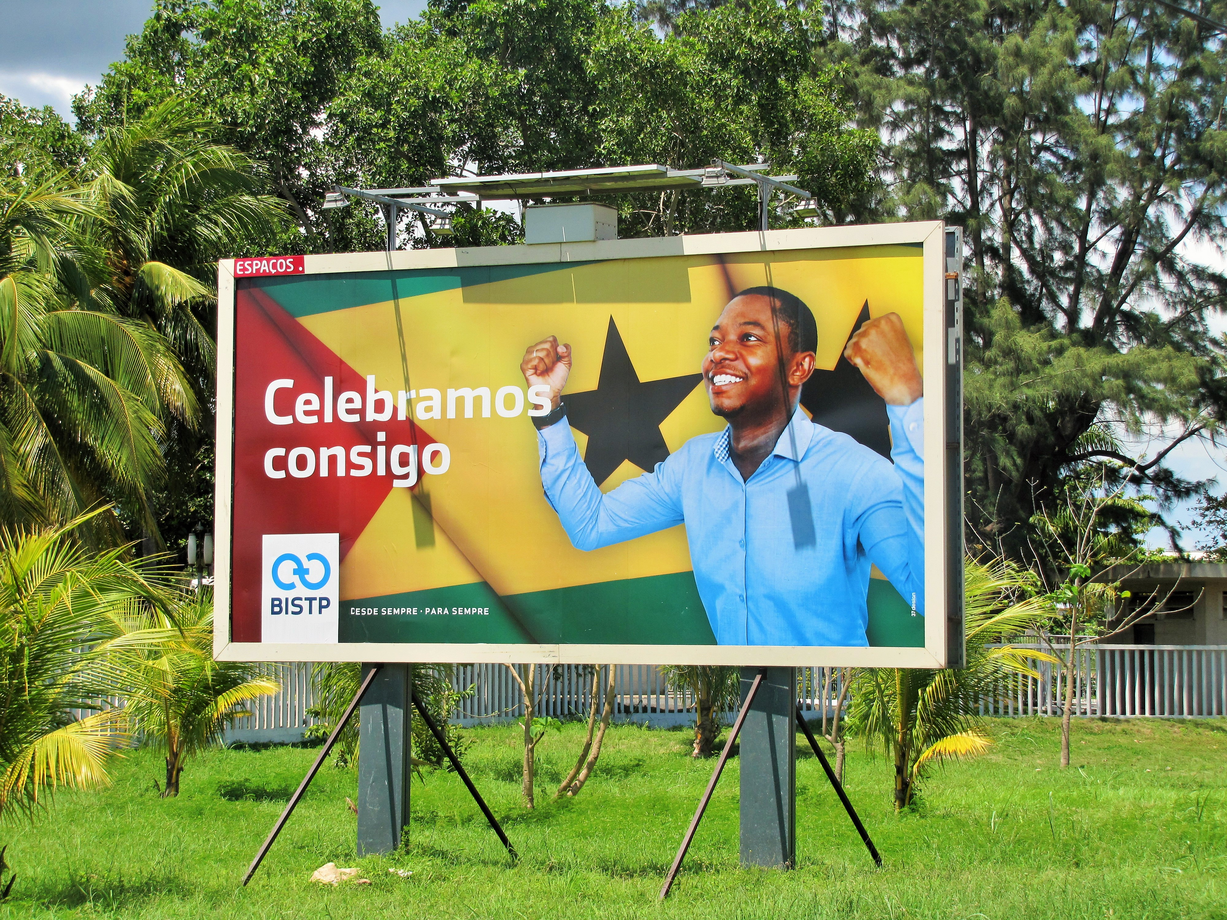 Sao Tome BISTP Celebramos Consigo